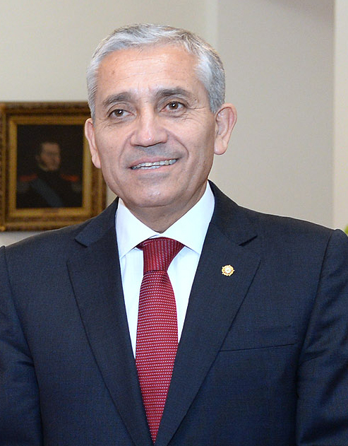 Héctor Espinosa Valenzuela, policía chileno.